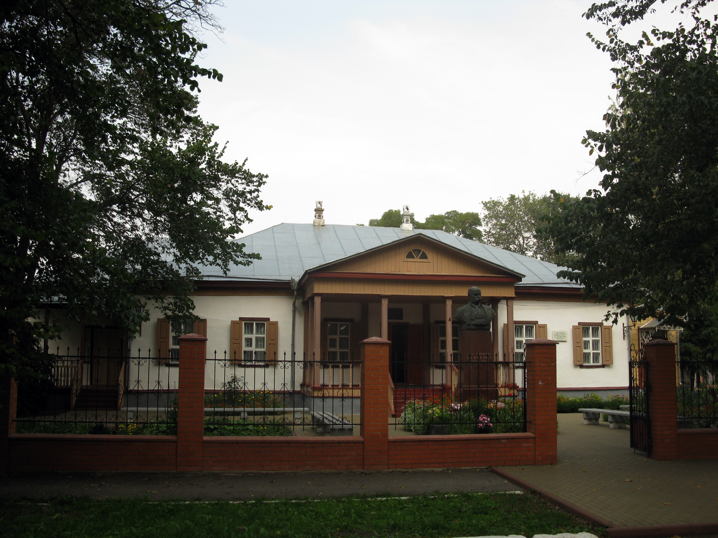 Будинок лікаря А.О. Козачковського. 1820р. - музей "Заповіту" Т.Г. Шевченка.